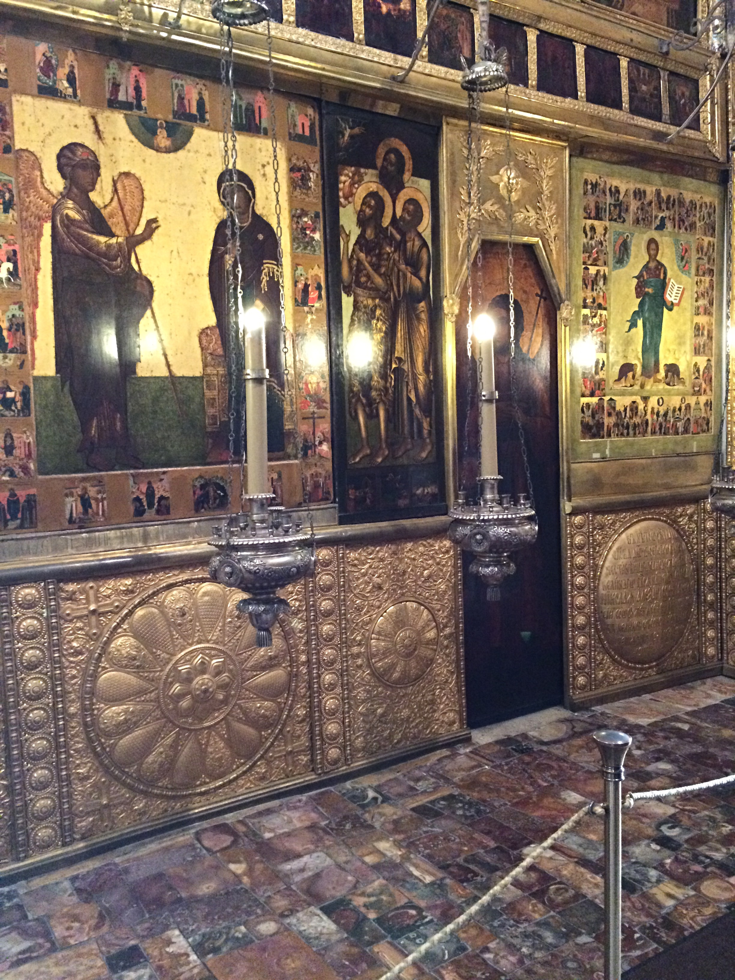 Фрагмент иконостаса Благовещенского собора Московского кремля с храмовой иконой "Благовещение" и патрональной иконой иконой царей Петра I и Ивана V